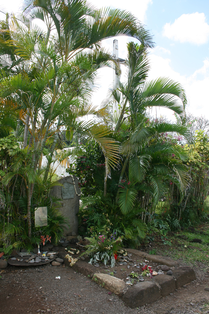 Tombe de Jacques Brel à Atuano (Hiva Oa)